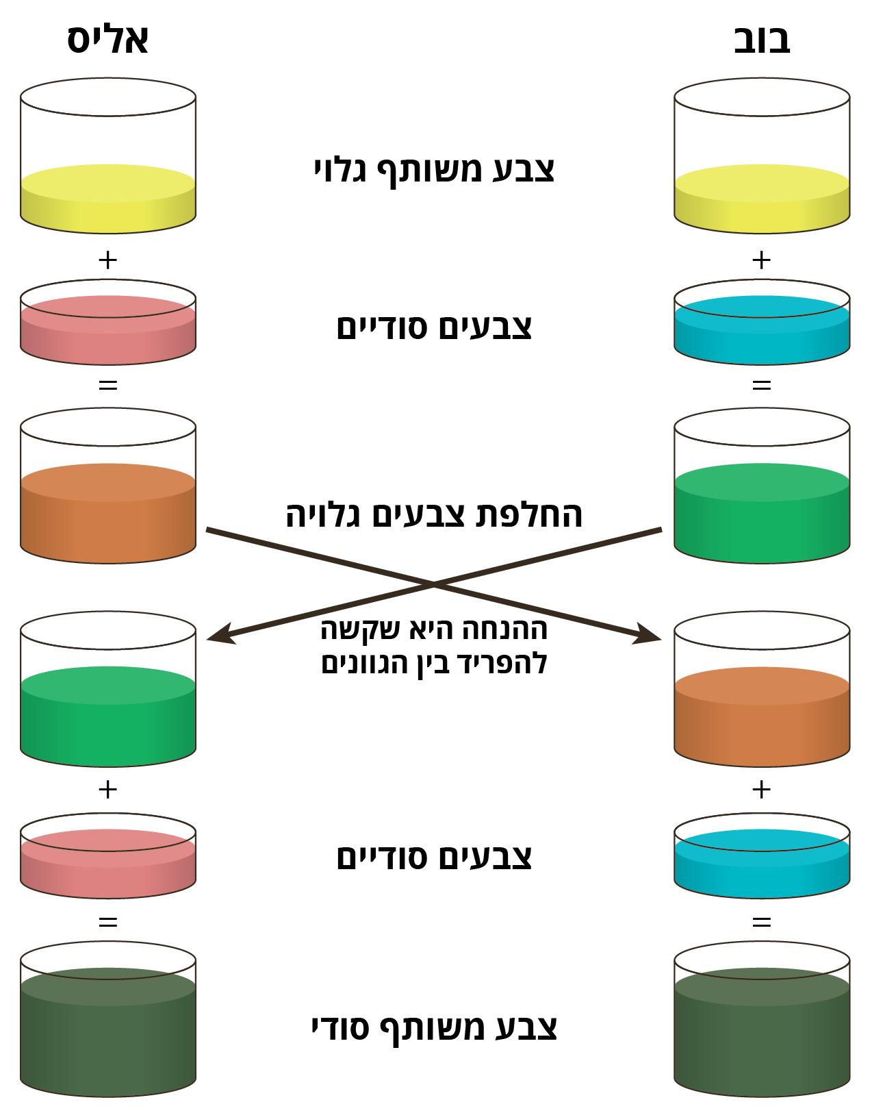 המחשת פרוטוקול שיתוף מפתח בעזרת צבעים